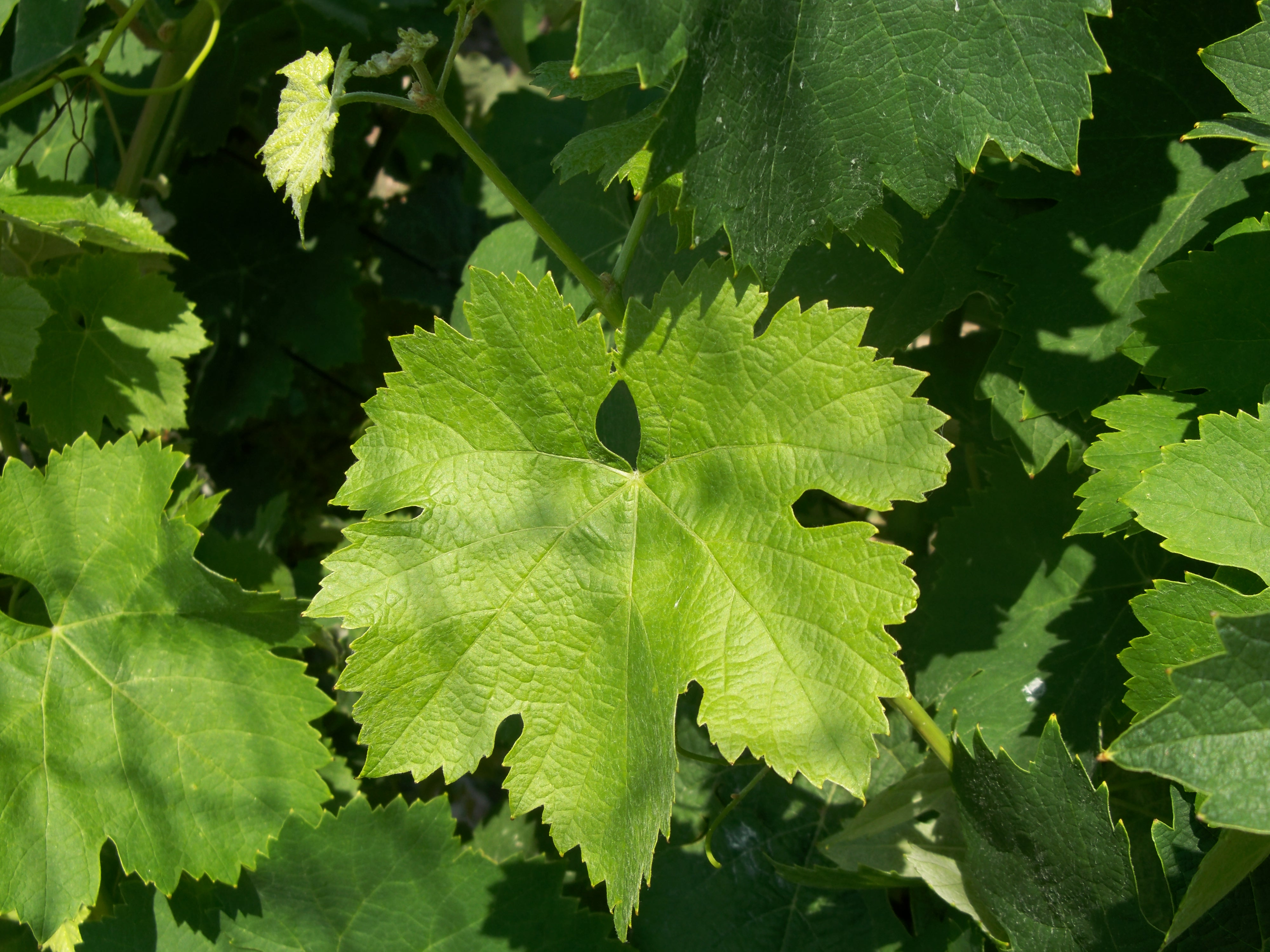 Feuilles de Vignes - Clairette